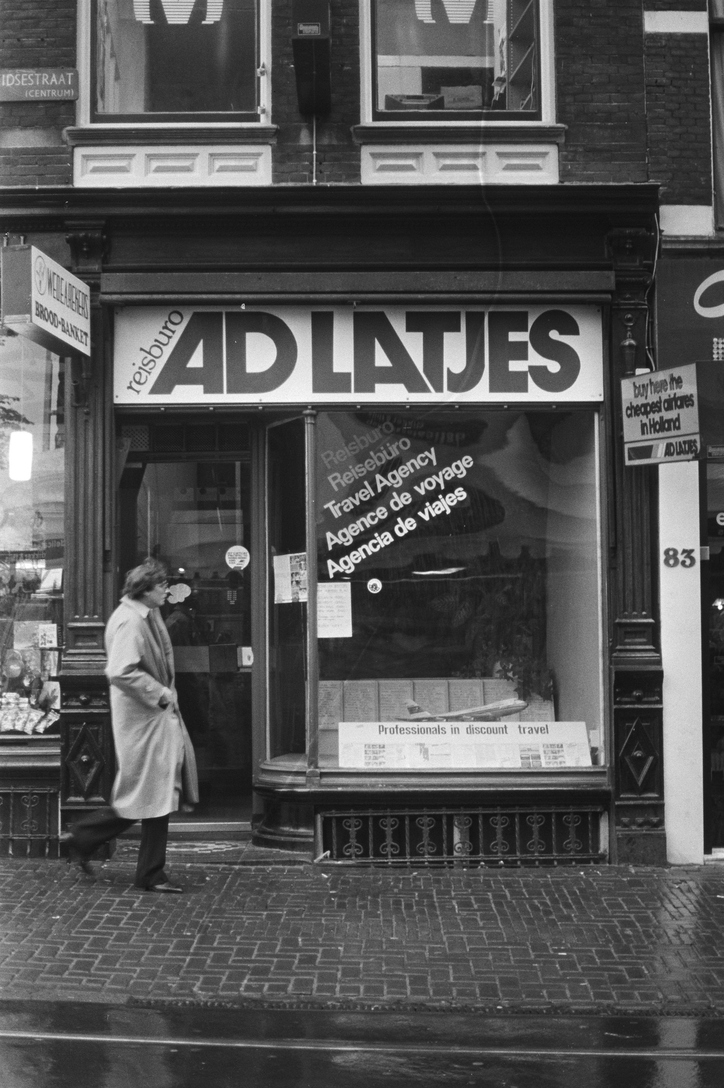 Collectie / Archief : Fotocollectie Anefo Reportage / Serie : [ onbekend ] Beschrijving : Reisbureau Ad Latjes in de Amsterdamse Leidsestraat schijnt in financiële moeilijkheden te verkeren Datum : 19 oktober 1981 Locatie : Amsterdam, Noord-Holland Trefwoorden : reisbureaus Fotograaf : Smirren, […] van / Anefo Auteursrechthebbende : Nationaal Archief Materiaalsoort : Negatief (zwart/wit) Nummer archiefinventaris : bekijk toegang 2.24.01.05 Bestanddeelnummer : 931-7472